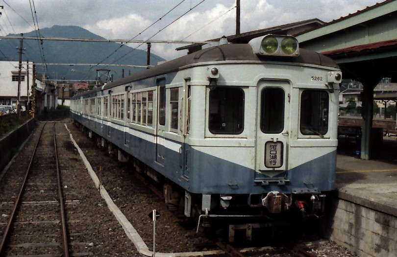 富士急行5200形電車。もと小田急電鉄1900形。